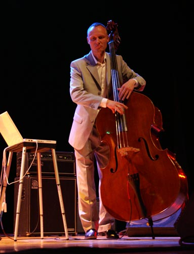 Jimmi Roger Pedersen - Beijing, China 2009